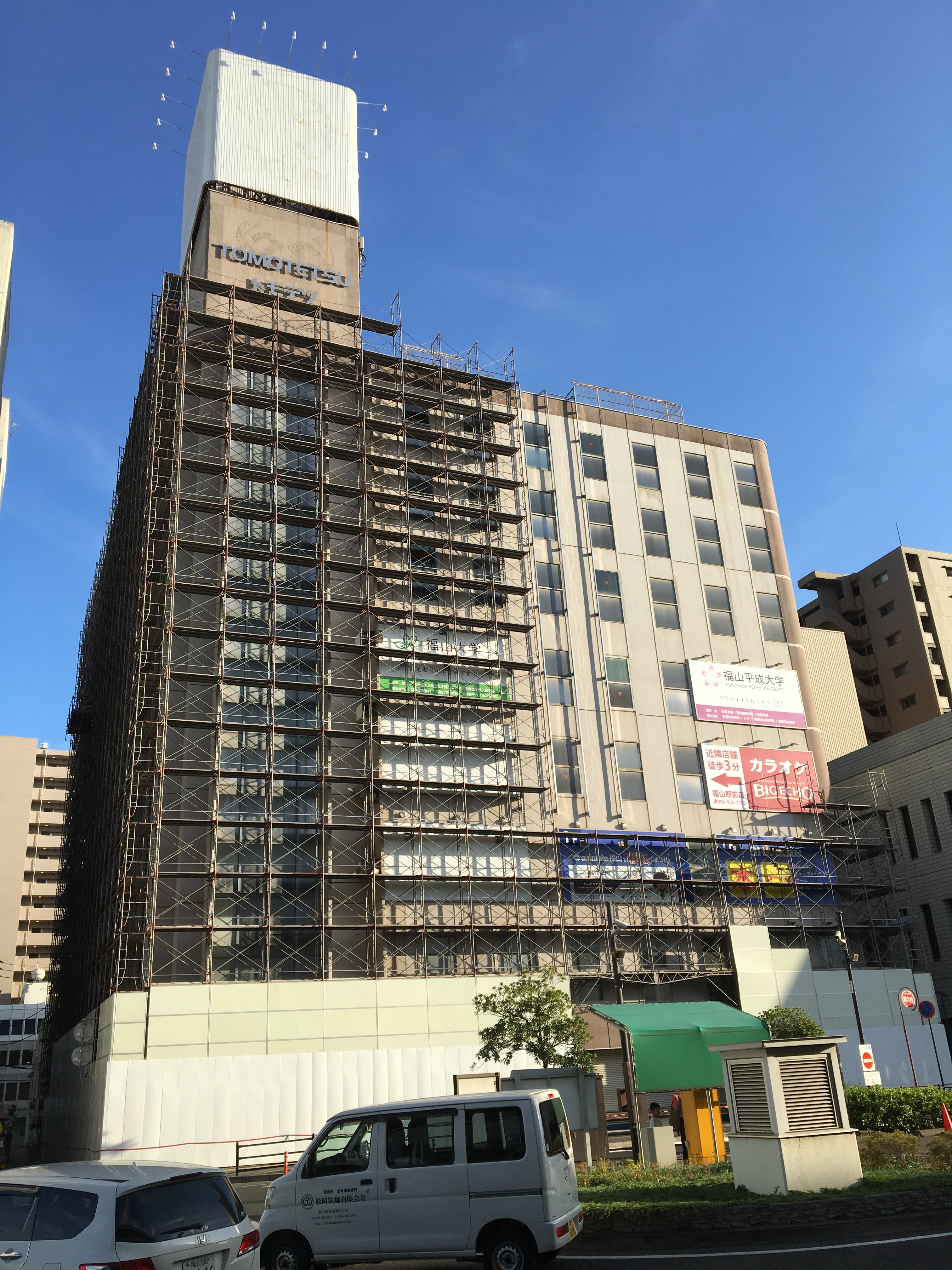 2018年8月に解体が始まった鞆鉄ビル。福山駅南口西側に存在した。解体作業に向けて足場の組み立て中。